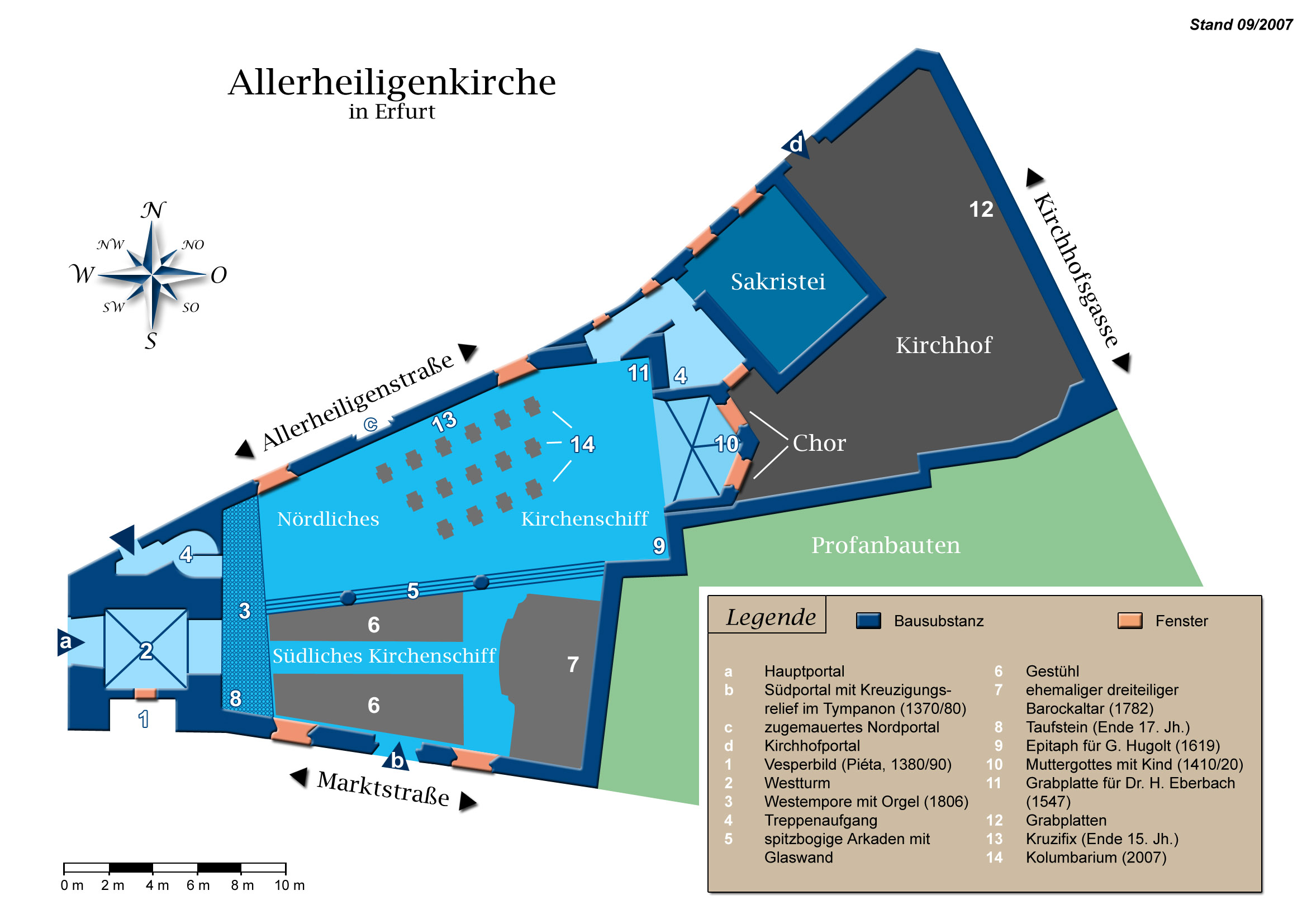 Grundriss der Allerheiligenkirche in Erfurt von 2007